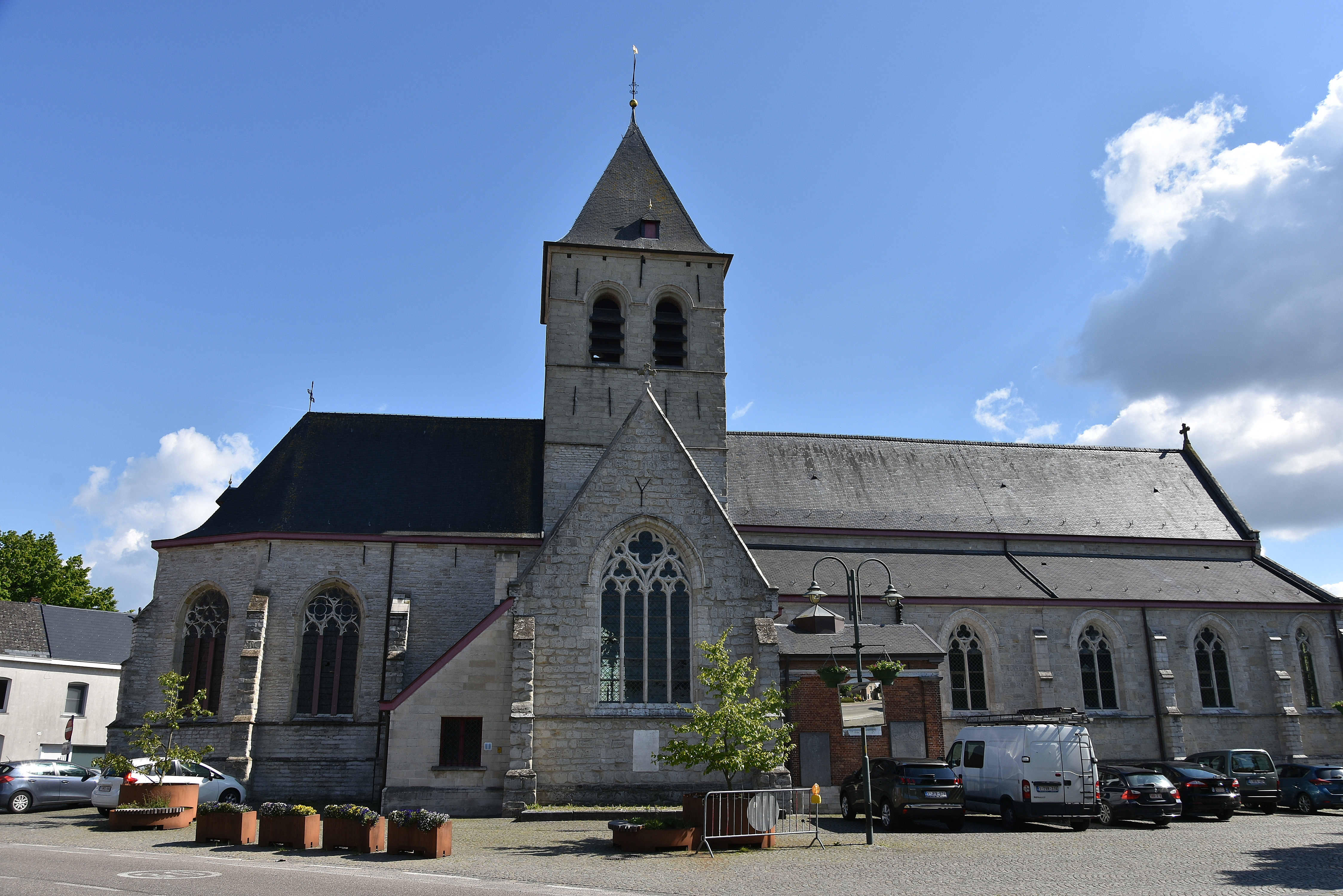 Sint-Salvatorkerk (Wieze) 12-05-2019 16-32-59